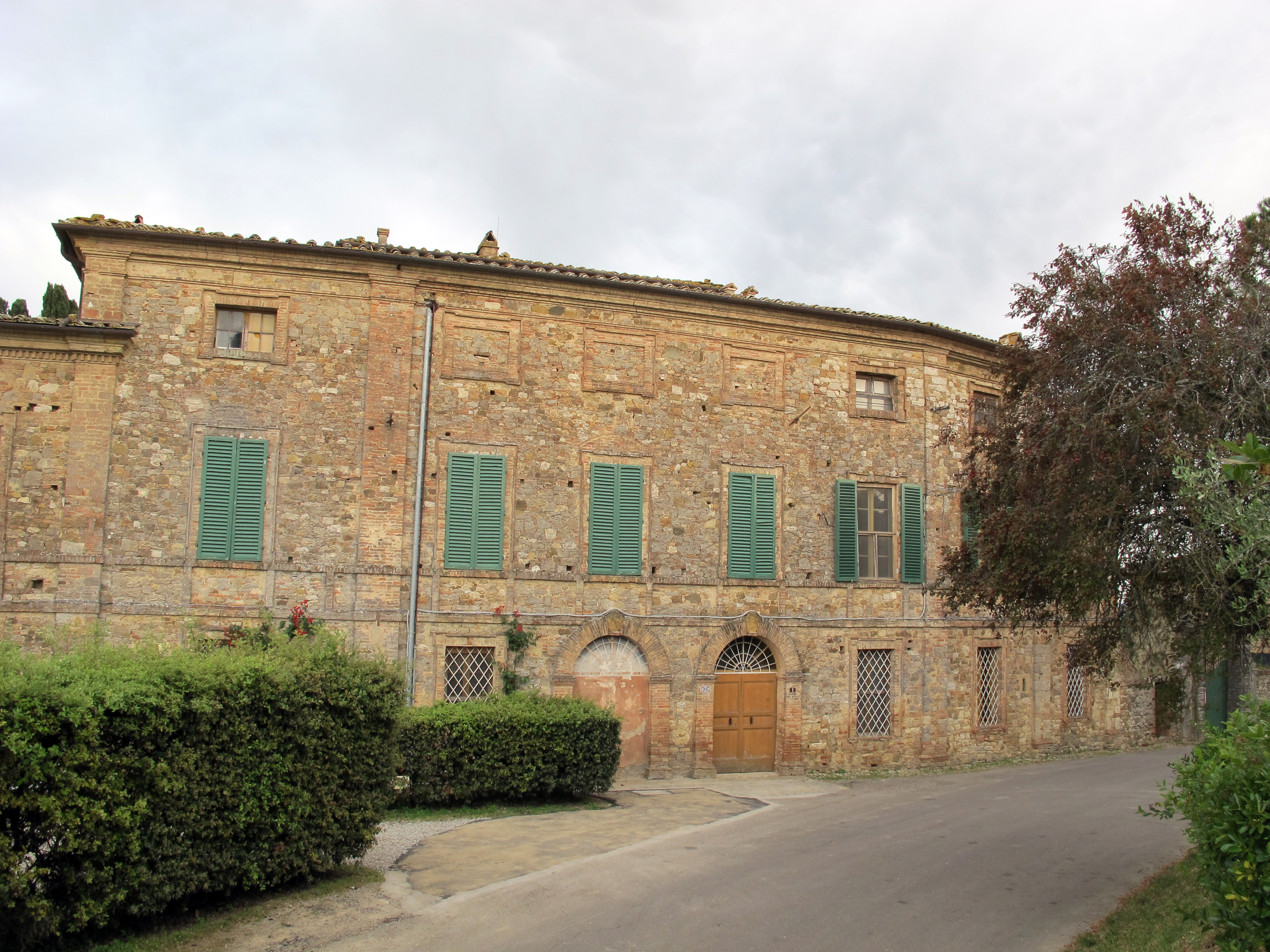 Villa di Geggiano